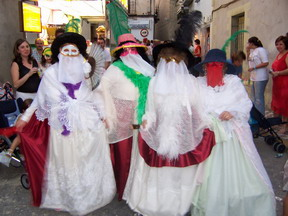 Es la más peculiar de nuestras tradiciones. Data del s. XVII y se ha mantenido con contadas lagunas hasta nuestros días. Tiene la peculiaridad, única en todo el país, de procesionar al Santísimo Sacramento como si de un Corpus se tratase. Se celebra el penúltimo domingo de Septiembre y su origen es el siguiente: entre los años 1.678 y 1.693 la comarca de Úbeda y Baeza sufrió unas terribles epidemias. Una de ellas , la "peste bubónica" afectó con especial virulencia a los muchachos (mozos) del pueblo. Según los estatutos de la Hermandad del Santísimo Sacramento 25 de ellos murieron. Cundió el pánico y se decidió sacar al Santísimo Sacramento en procesión rogativa. Desde entonces la epidemia remitió y las pobres gentes de aquélla época lo achacaron a la rogativa. Los mozos que sobrevivieron y demás población decidieron conmemorar dicho acontecimiento sacando en procesión la Santa Custodia el tercer domingo de Septiembre y celebrando después tres días de "máscaras" en los cuales se disfrazarían para mostrar su alegría. Estos días de máscaras se han convertido en un auténtico carnaval veraniego en que se da rienda suelta a la imaginación, la burla, la ironía y la crítica. La fotografía fue tomada el 19-09-2.005 por Cristóbal Pulpillo López.